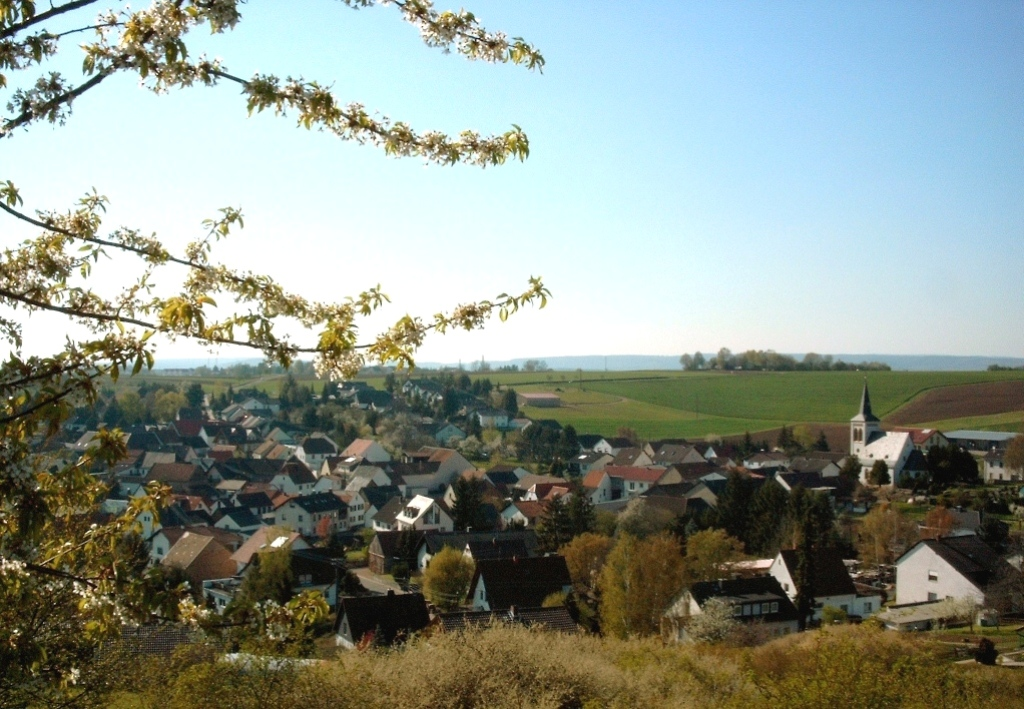 Blick aus den Weinbergen nach Traisen bei Bad Kreuznach